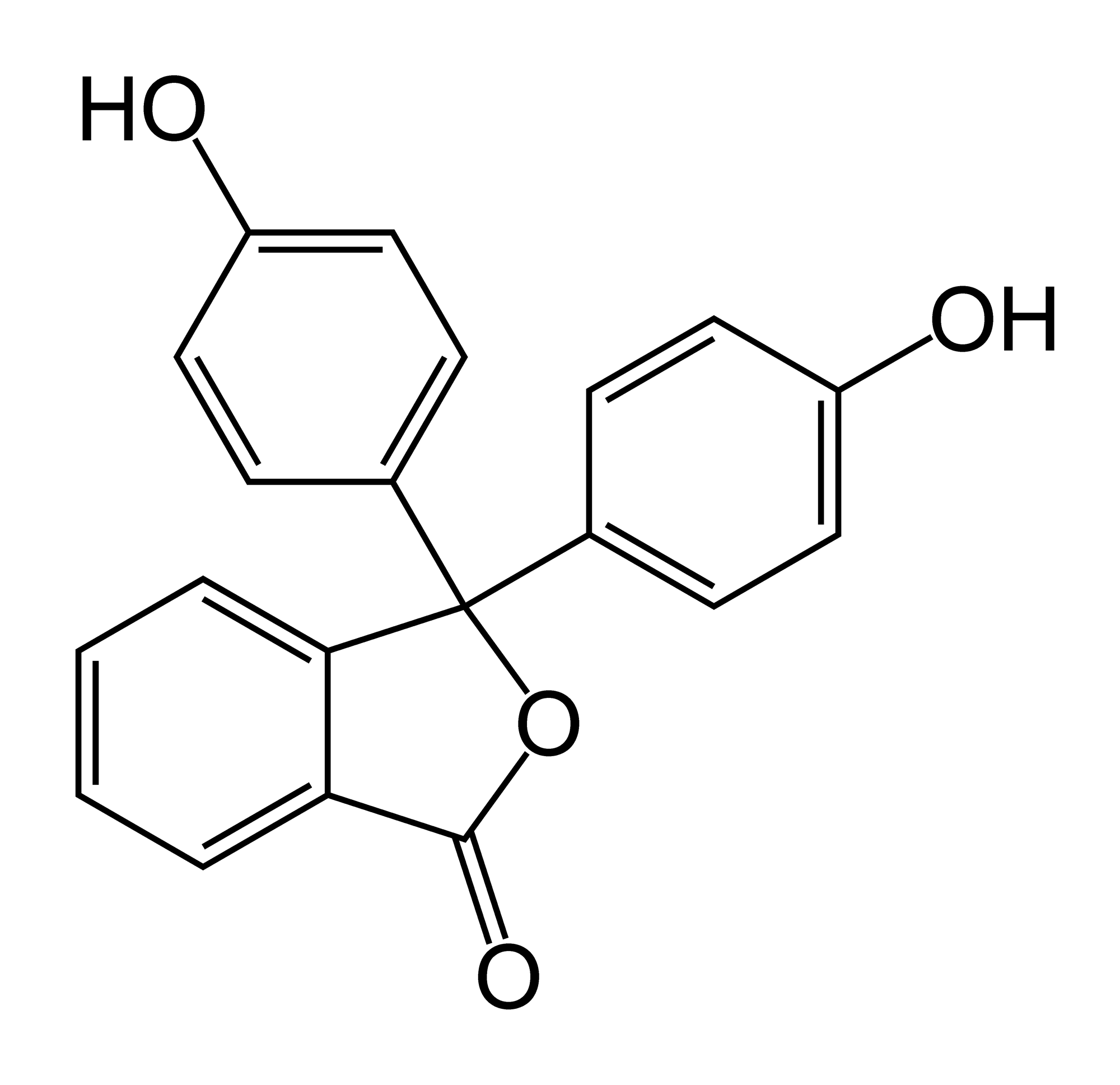 Phenolphthalein